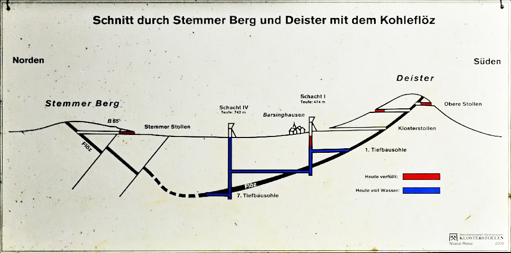 Klosterstollen Barsinghausen 2015